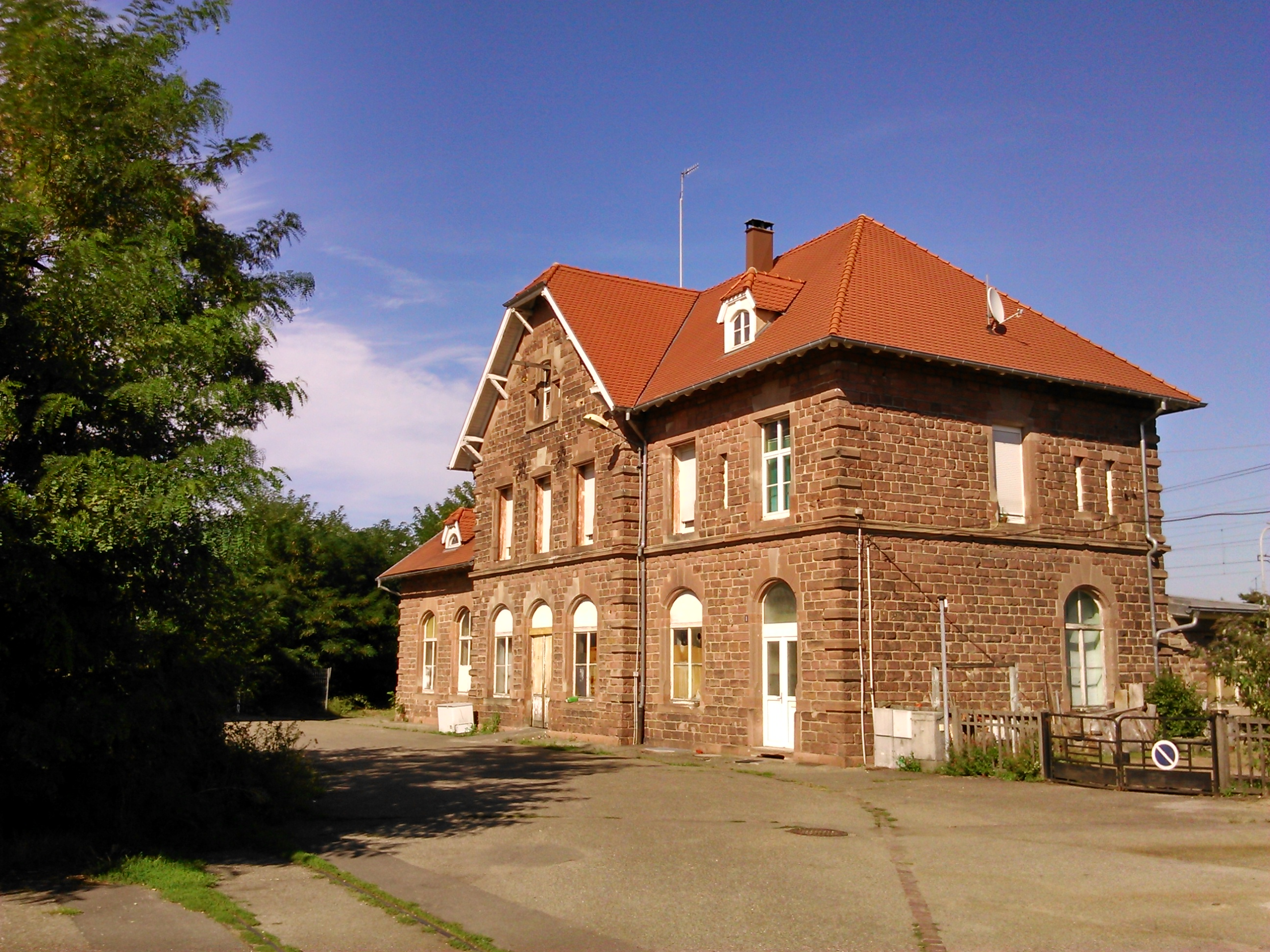 Ancienne gare de Bennwihr.